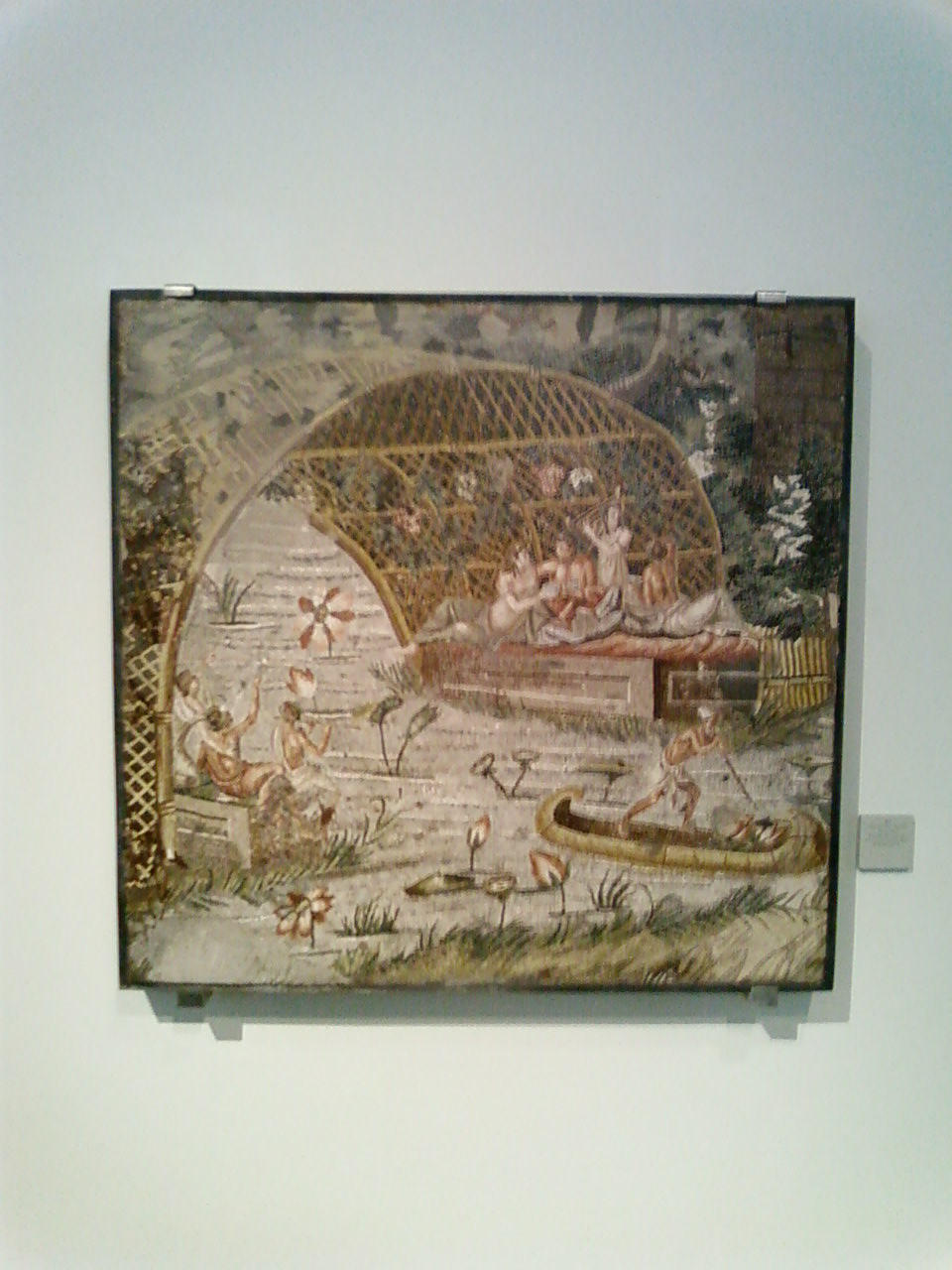 Morceau de la grande mosaïque du Nil de Praeneste - Altes Museum, Berlin